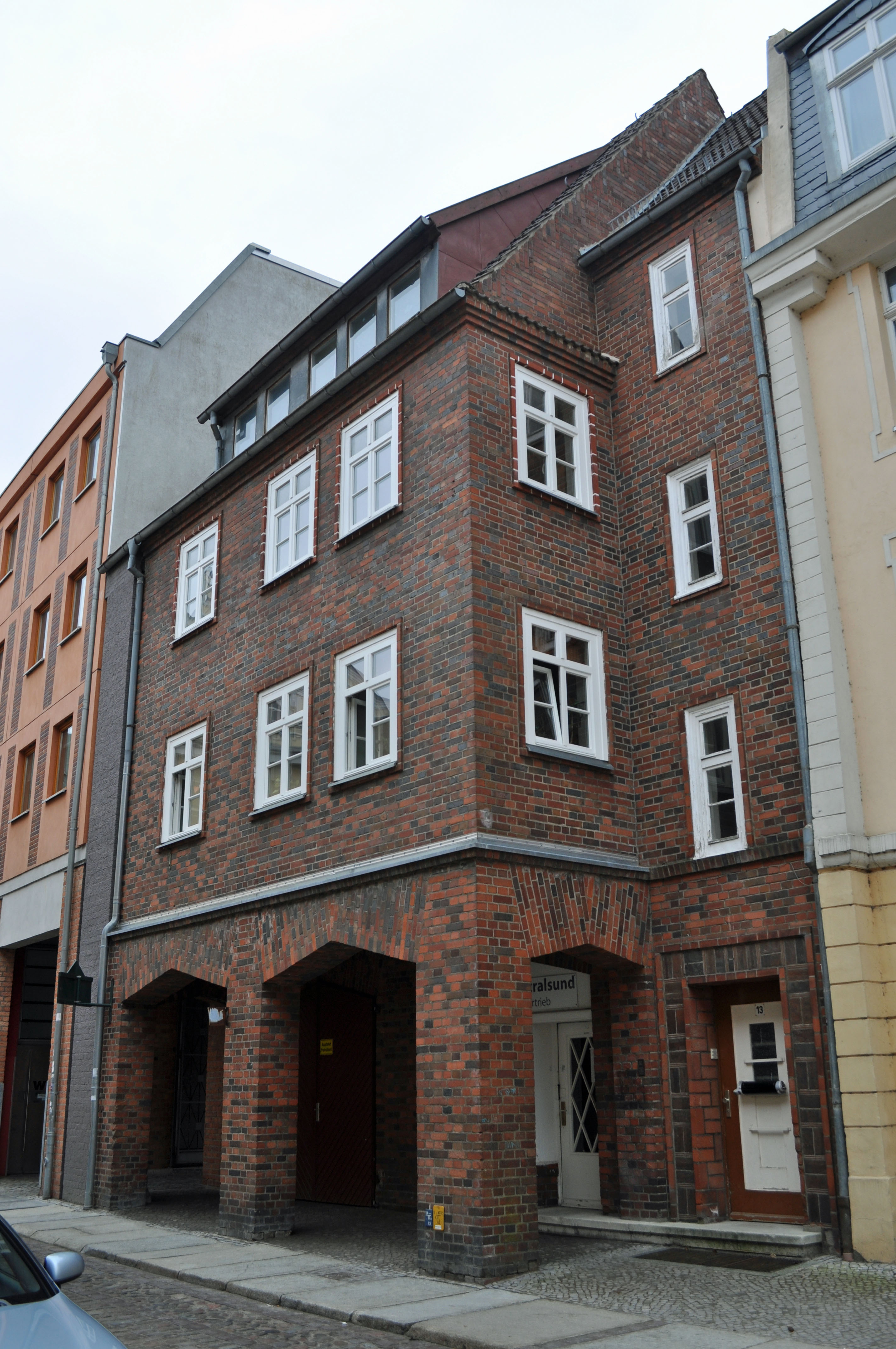 Gebäude bzw. Gebäudedetail in Stralsund. Straße und Hausnummer siehe Dateiname.